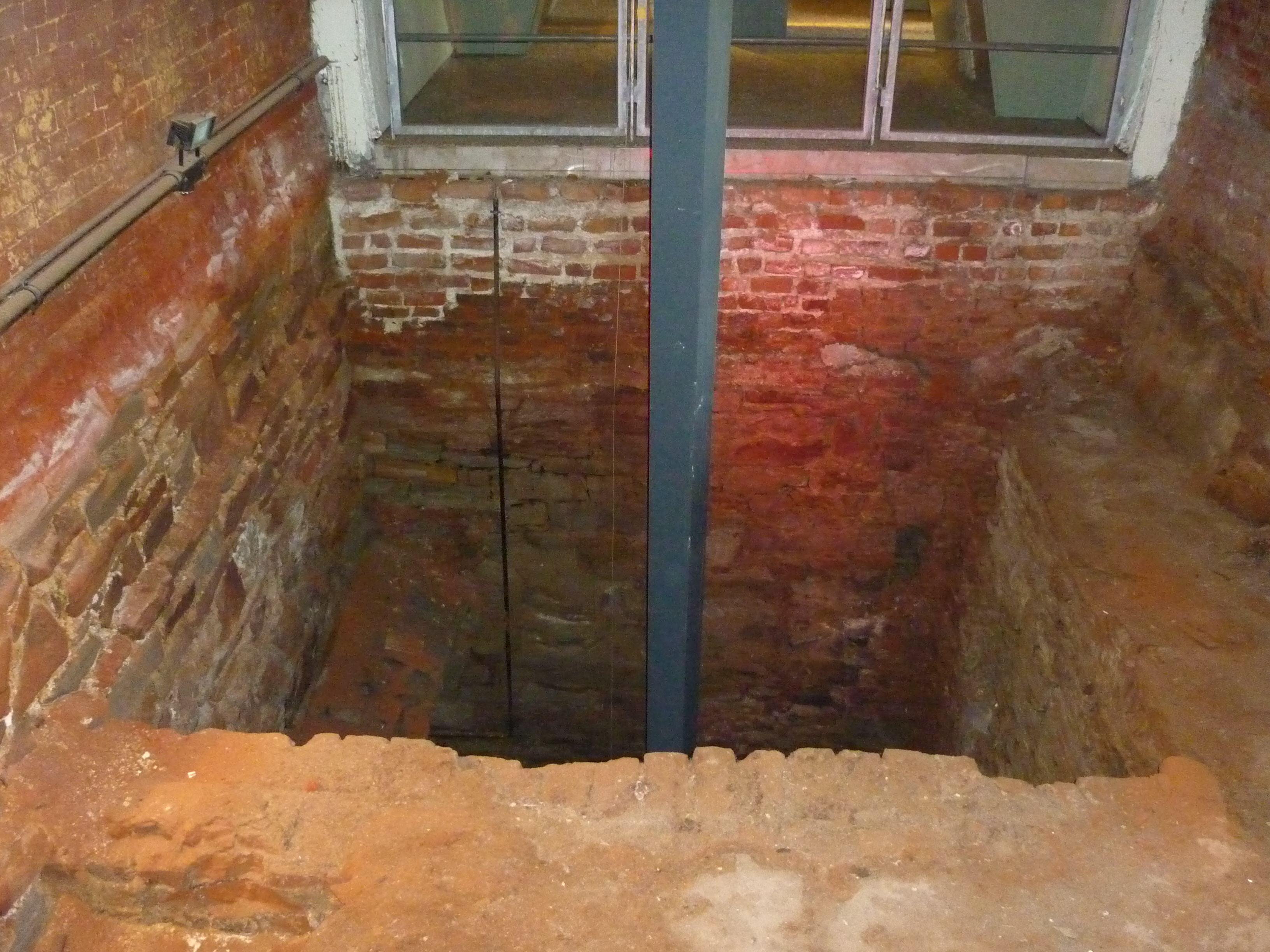 Der freigelegte Schacht Hercules der früheren Zeche Nachtigall im Ringofen-Gebäude der ehemaligen Ziegelei Dünkelberg, LWL-Industriemuseum Zeche Nachtigall, Witten-Bommern